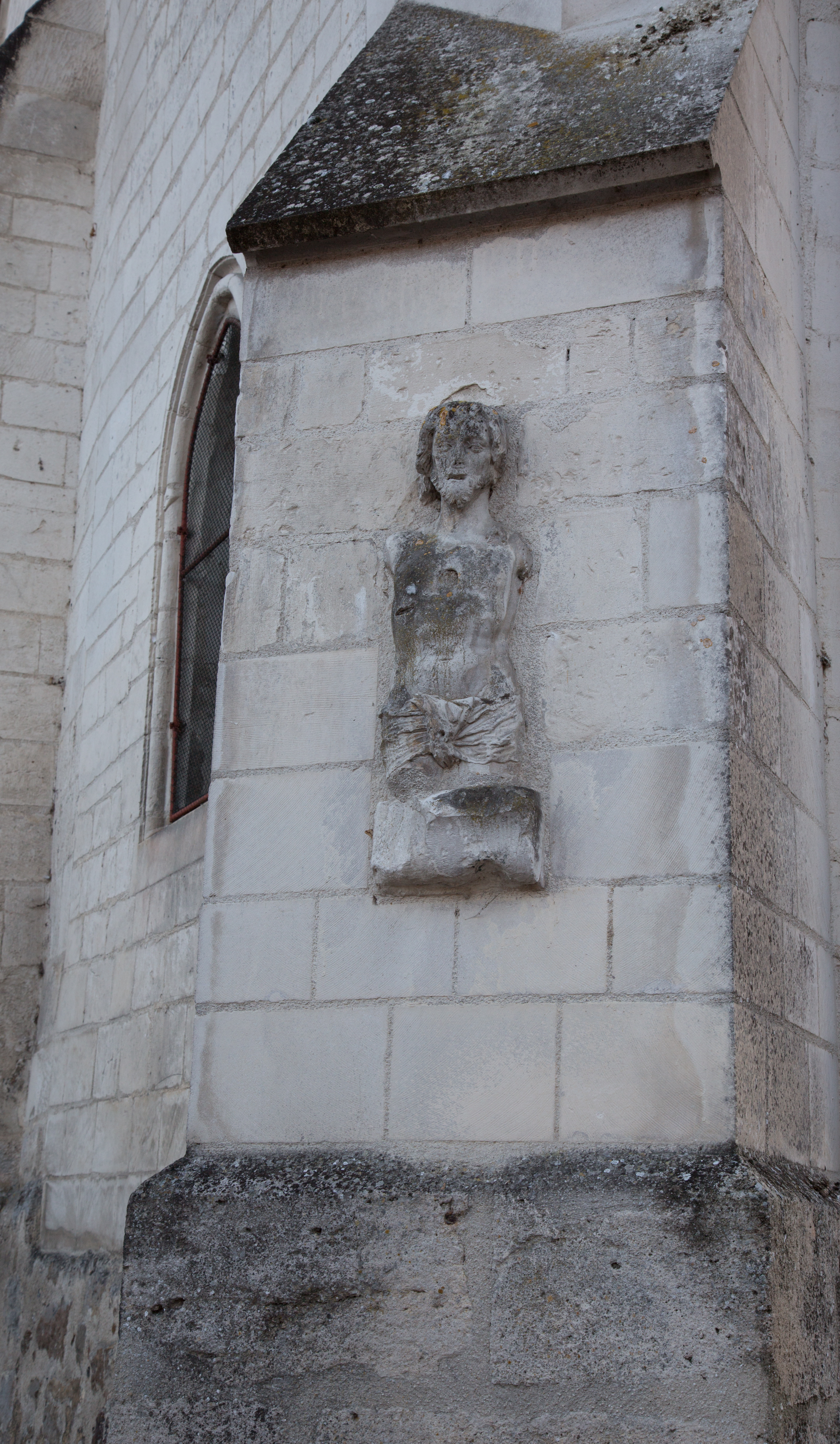 Église Saint-Martin détail vu coté route de Maizières.